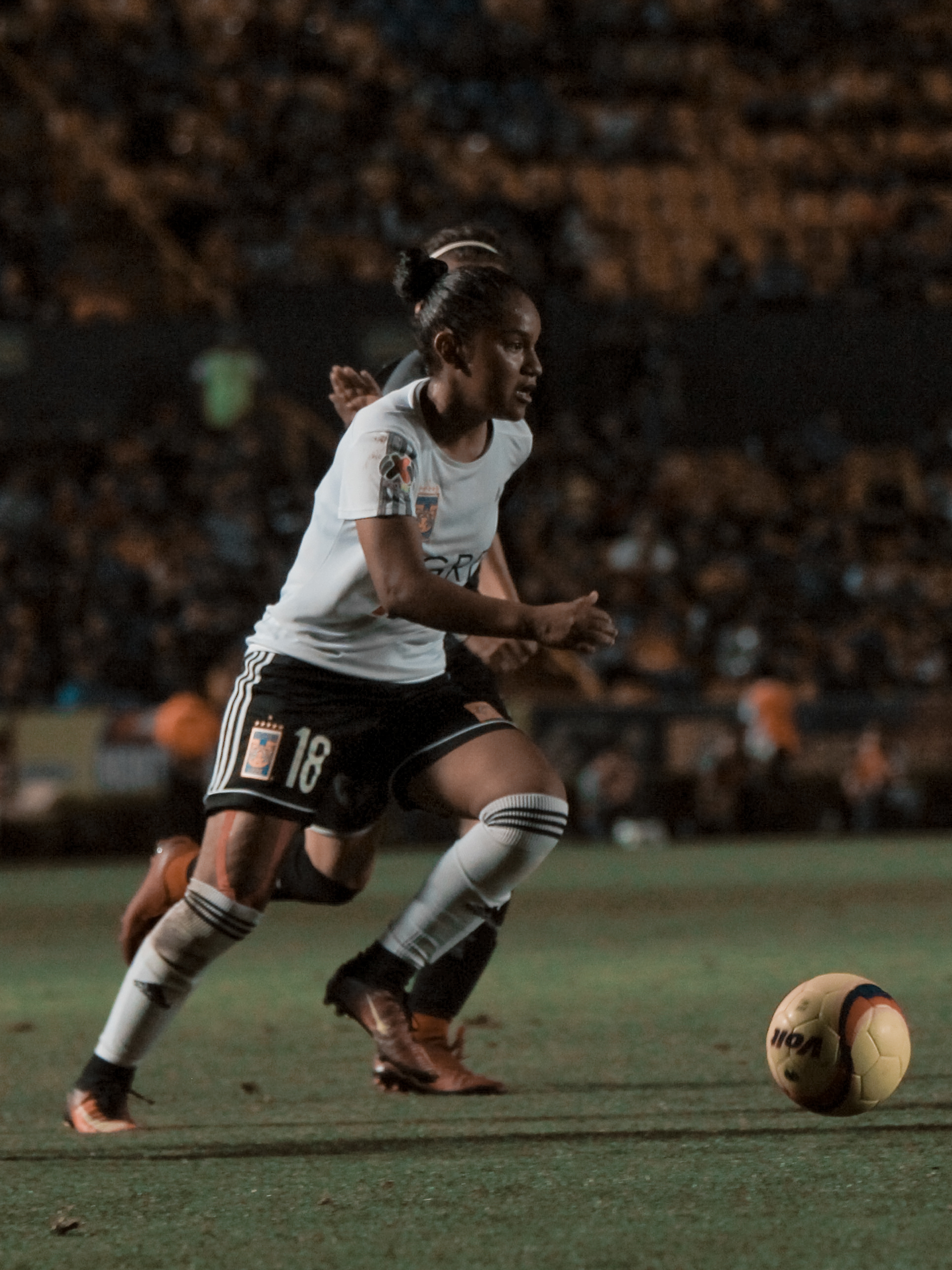 Belén Cruz, jugadora de futbol mexicana.